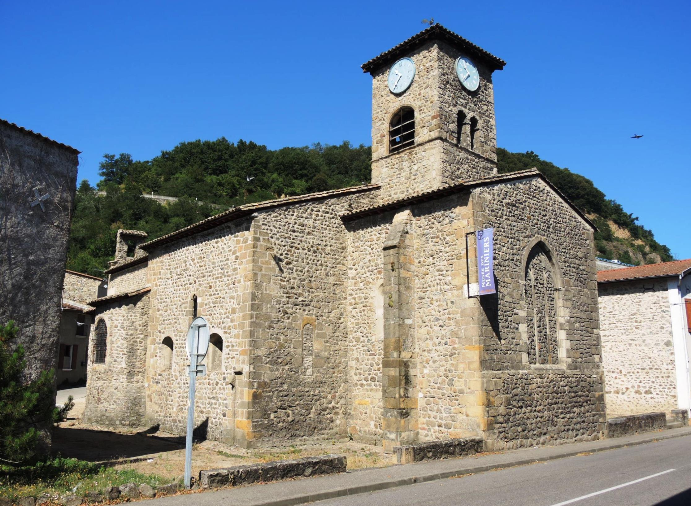 Serrières (Ardèche) détail